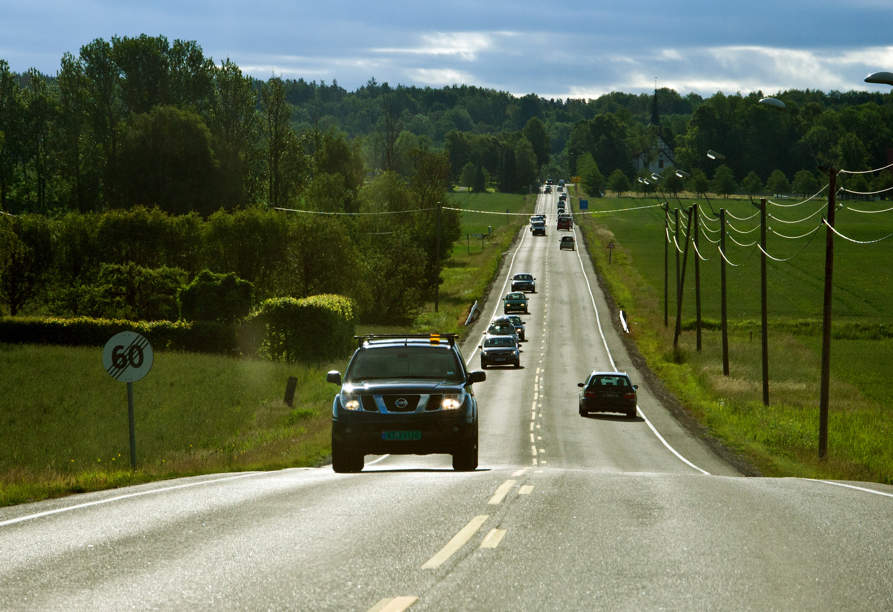 Jarlsberggata, Tønsberg